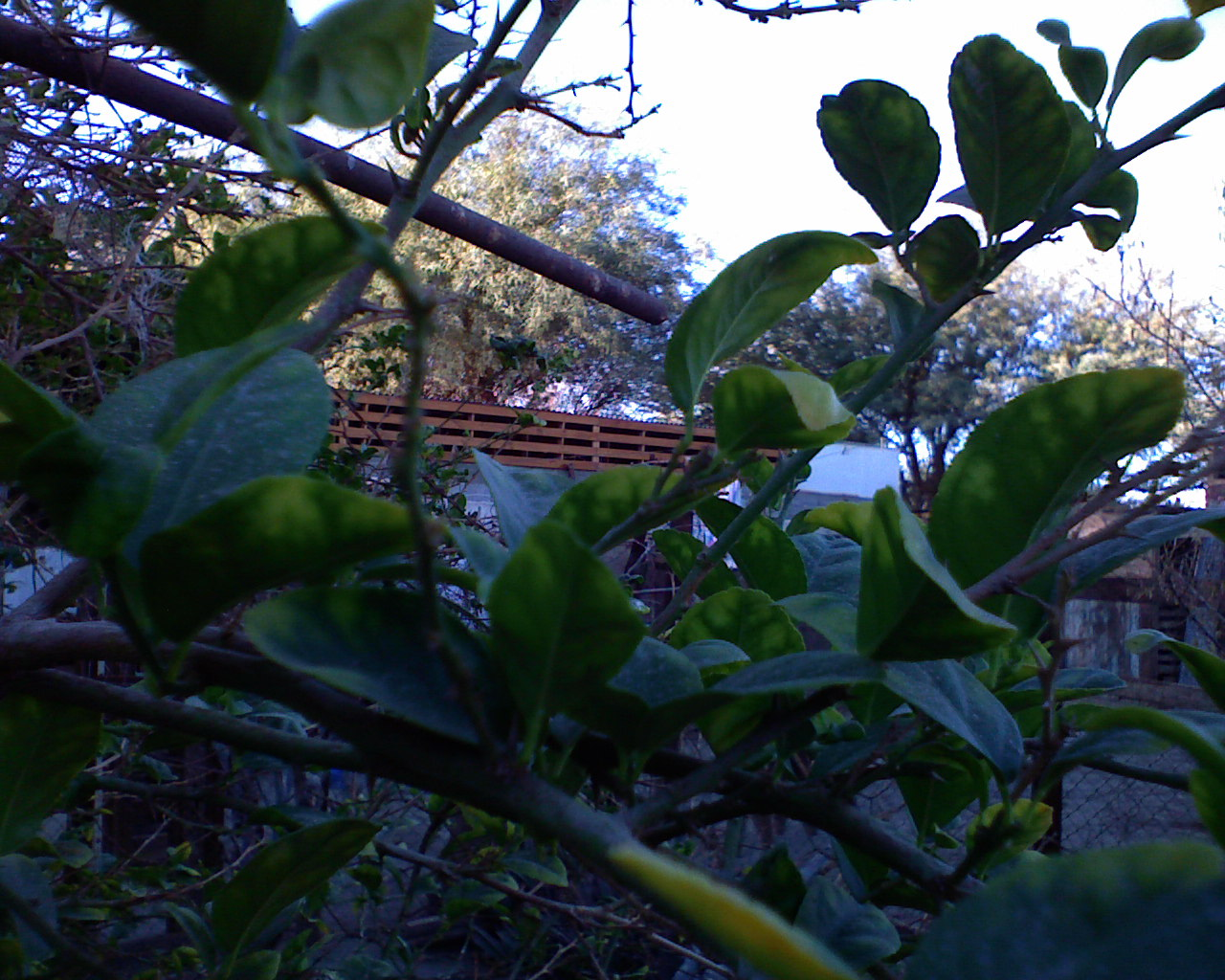 Foto de unas hojas, tomada con el celular Sony Ericsson K510